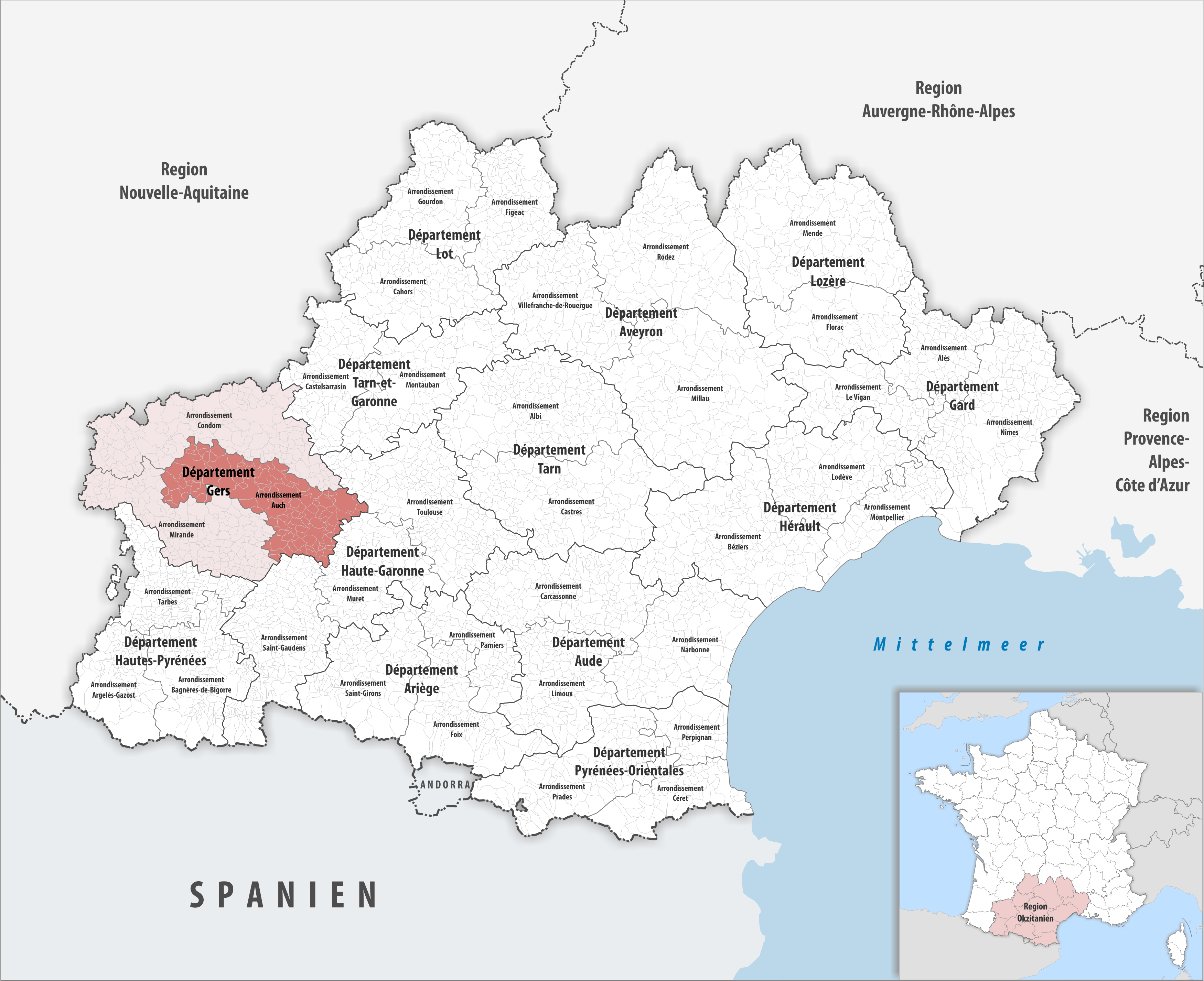 Lage des Arrondissements Auch